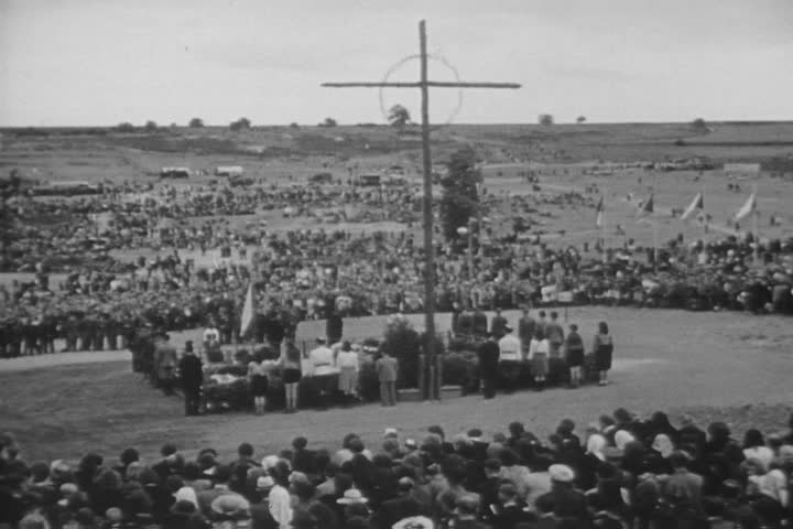 Poválečné uctění Lidických obětí, záběr z amerického filmového týdeníku "The March of Time".